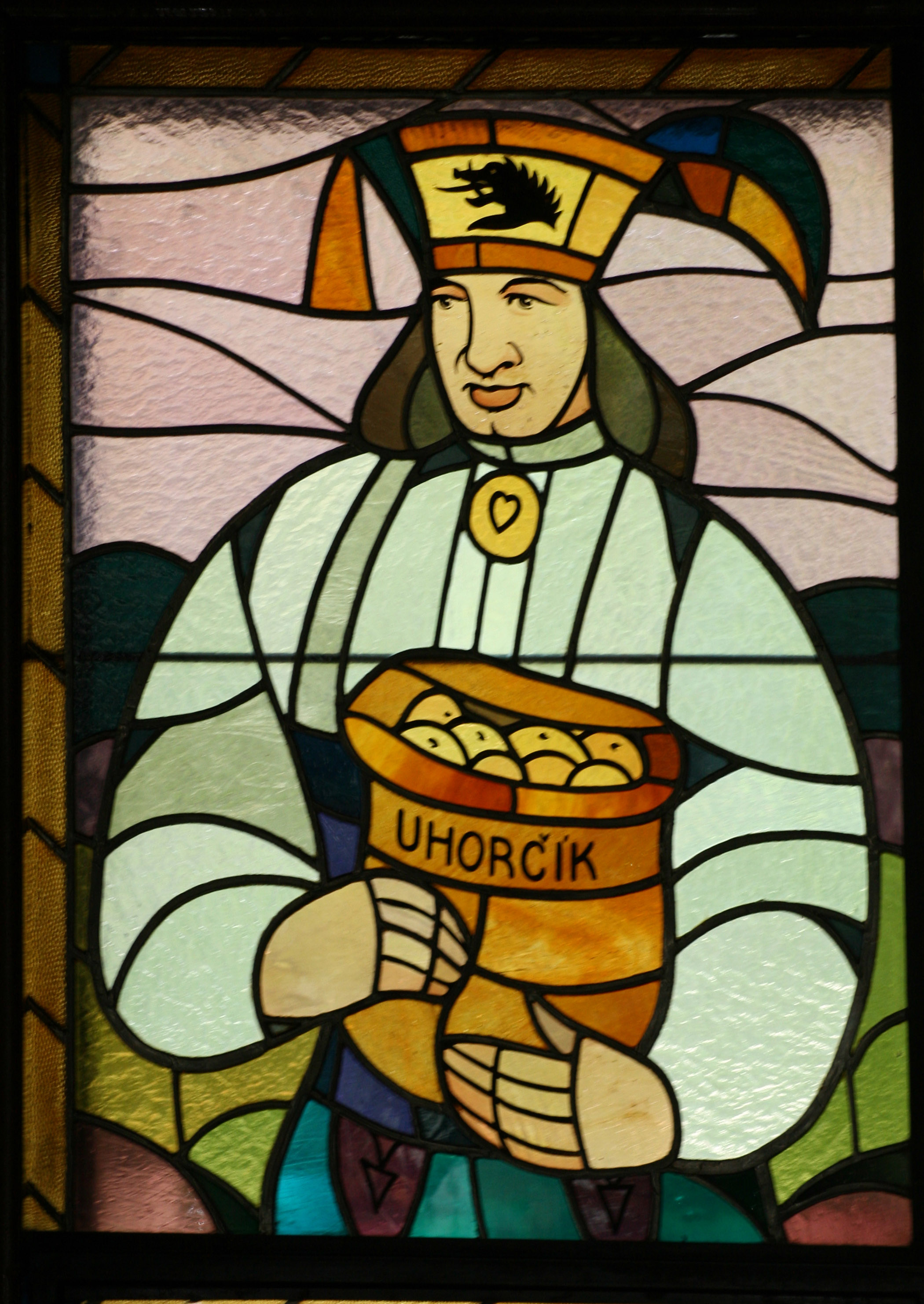 Autorom vitráže v interiéri PKO v Bratislave v roku 1957 bol národný umelec Janko Alexy